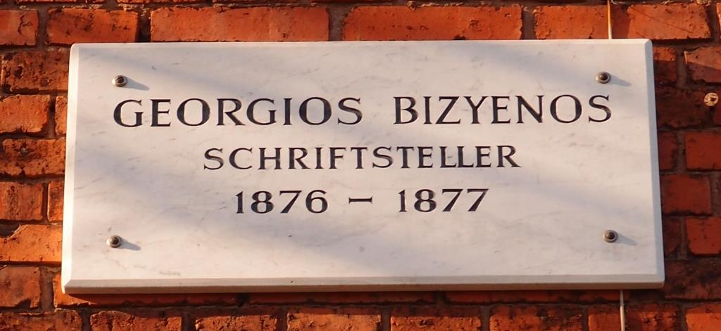 Tafel für den Schriftsteller und Gelehrten Georgios Bizyinos (Vizyinos), 1849-1896, in Göttingen, Goßlerstraße 2